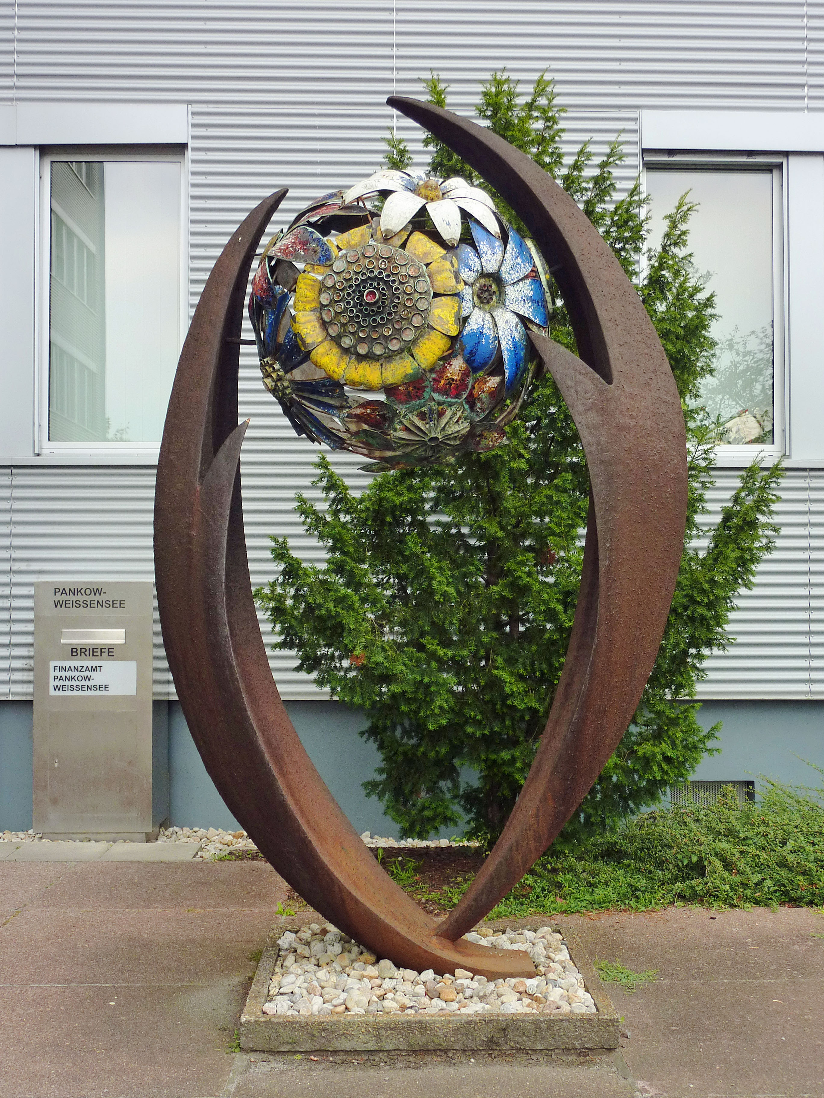 Plastik 'Blütenball' von Joachim Liebscher in der Storkower Straße 134 vor dem Finanzamt Prenzlauer Berg und Pankow/Weißensee.